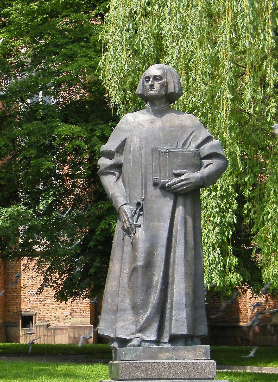 Памятник Юрию Дрогобычу